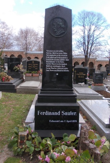 Grab Ferdinand Sauter-Hernalser Friedhof